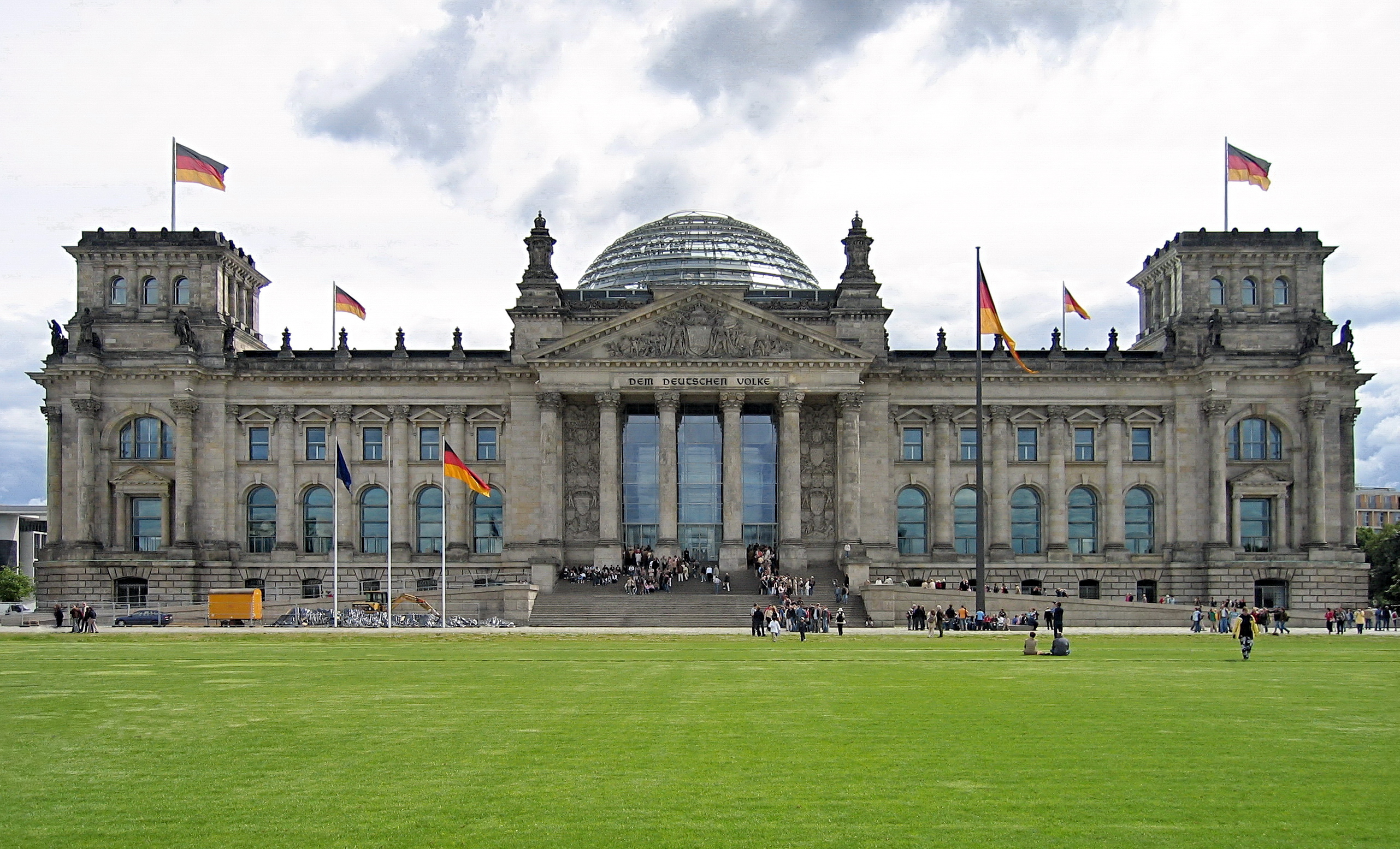 de Beschreibung: Reichstagsgebäude in Berlin mit Wiese Quelle: selbst fotografiert von Johann H. Addicks Lizenz: unter PD gestellt von Johann H. Addicks Entstehungsdatum: Juni 2005 en Source: Taken by Benutzer:-jha- Date: June 2005 image moved from Image:Reichstag mit Wiese.jpg